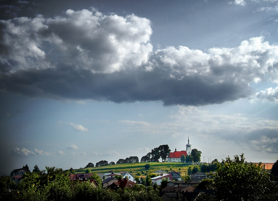 Klimont